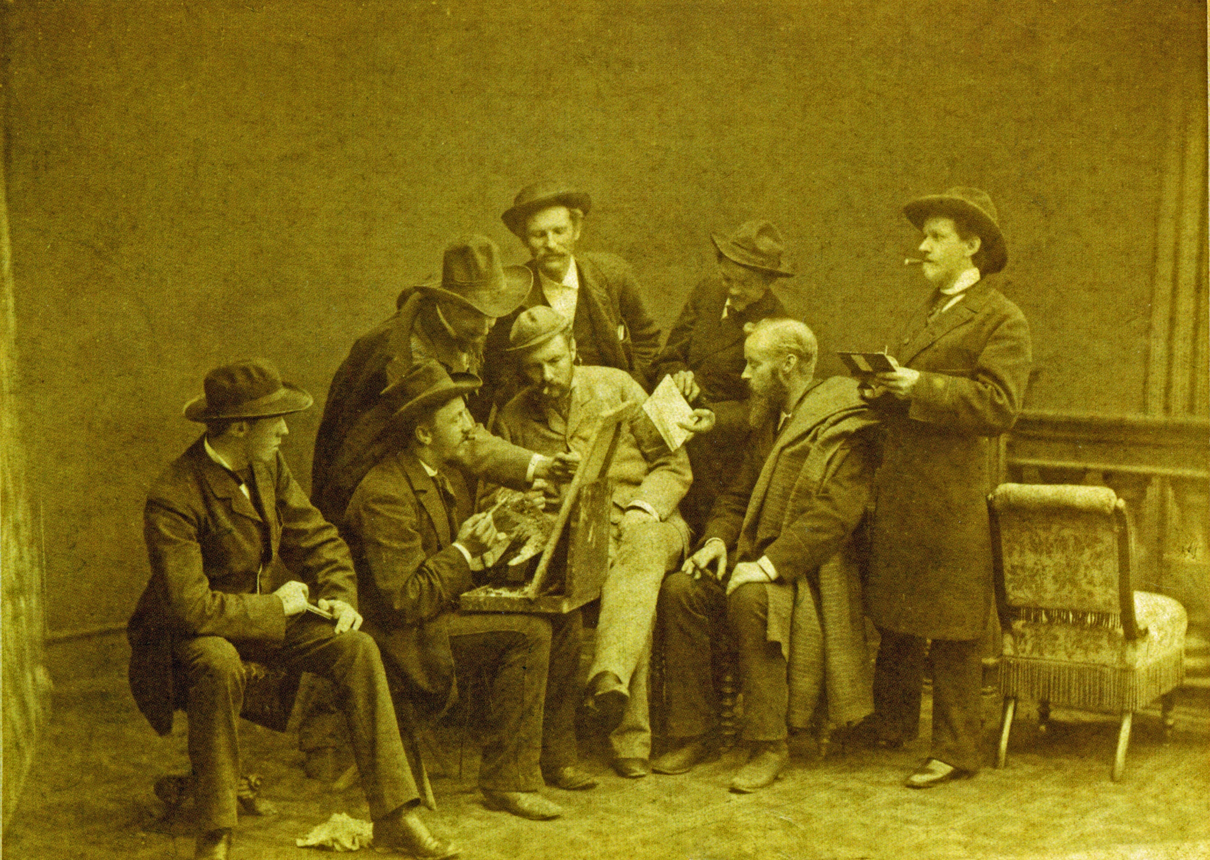 Die Gründer der Ekensunder Künstlerkolonie, Foto von Wilhelm Dreesen aus dem Jahr 1882. Erich Kubierschky mit großen Schlapphut, 1. links oben Wilhelm Dreesen, 2. links oben Johann Sander, 3. links oben Petersen (Flensburg), 1. links unten Johannes Knutz, 2. links unten Fritz Stoltenberg, 3. links unten Heinrich Petersen-Angeln, 4. links unten Jacob Nöbbe, 5. links unten